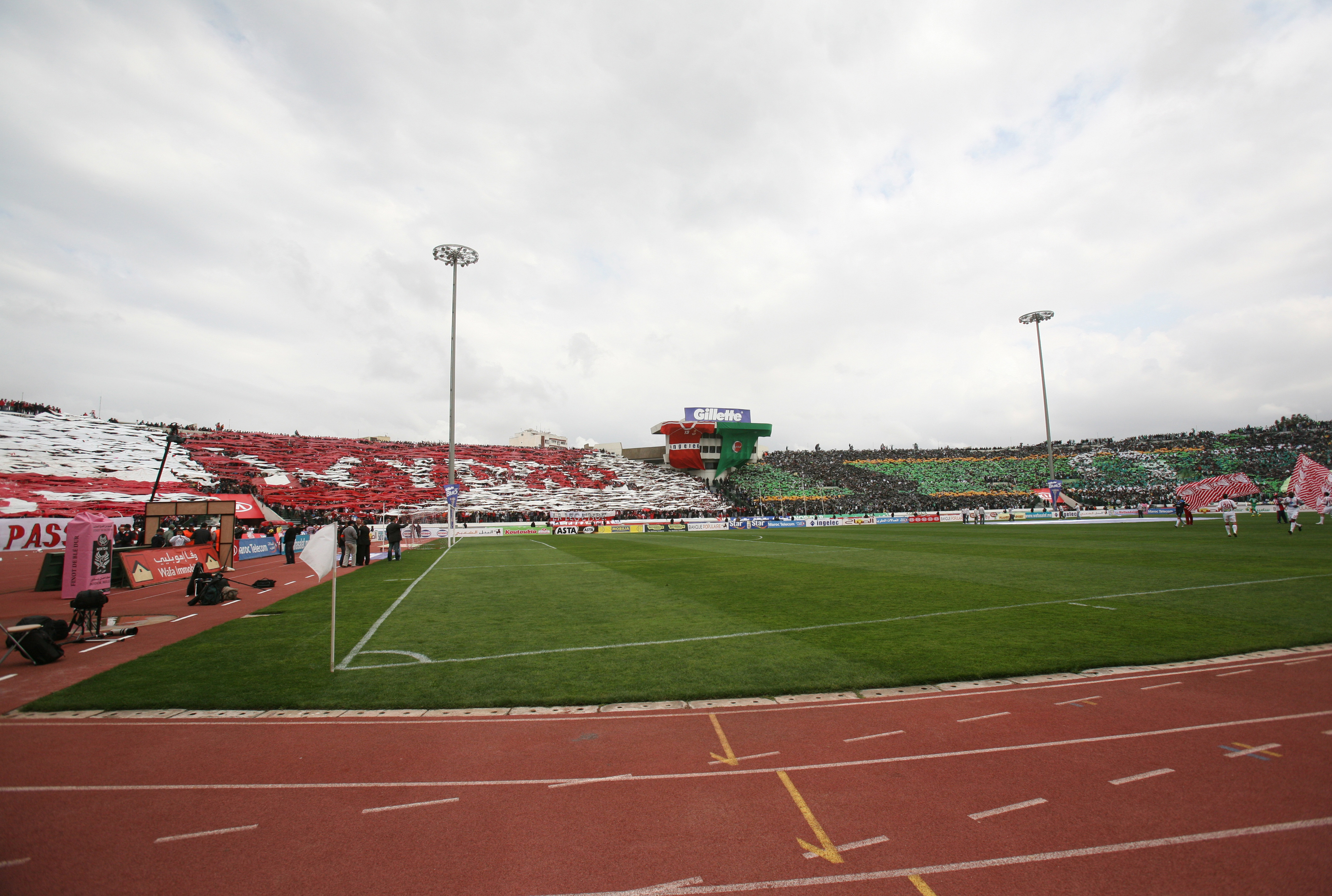 Tifos du Raja et du Wydad